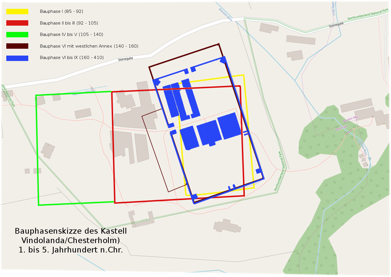 Planskizze der Bauphasen des Kastell Vindolanda/Chersterholm (GB), 1. bis 5. Jahrhundert n.Chr.